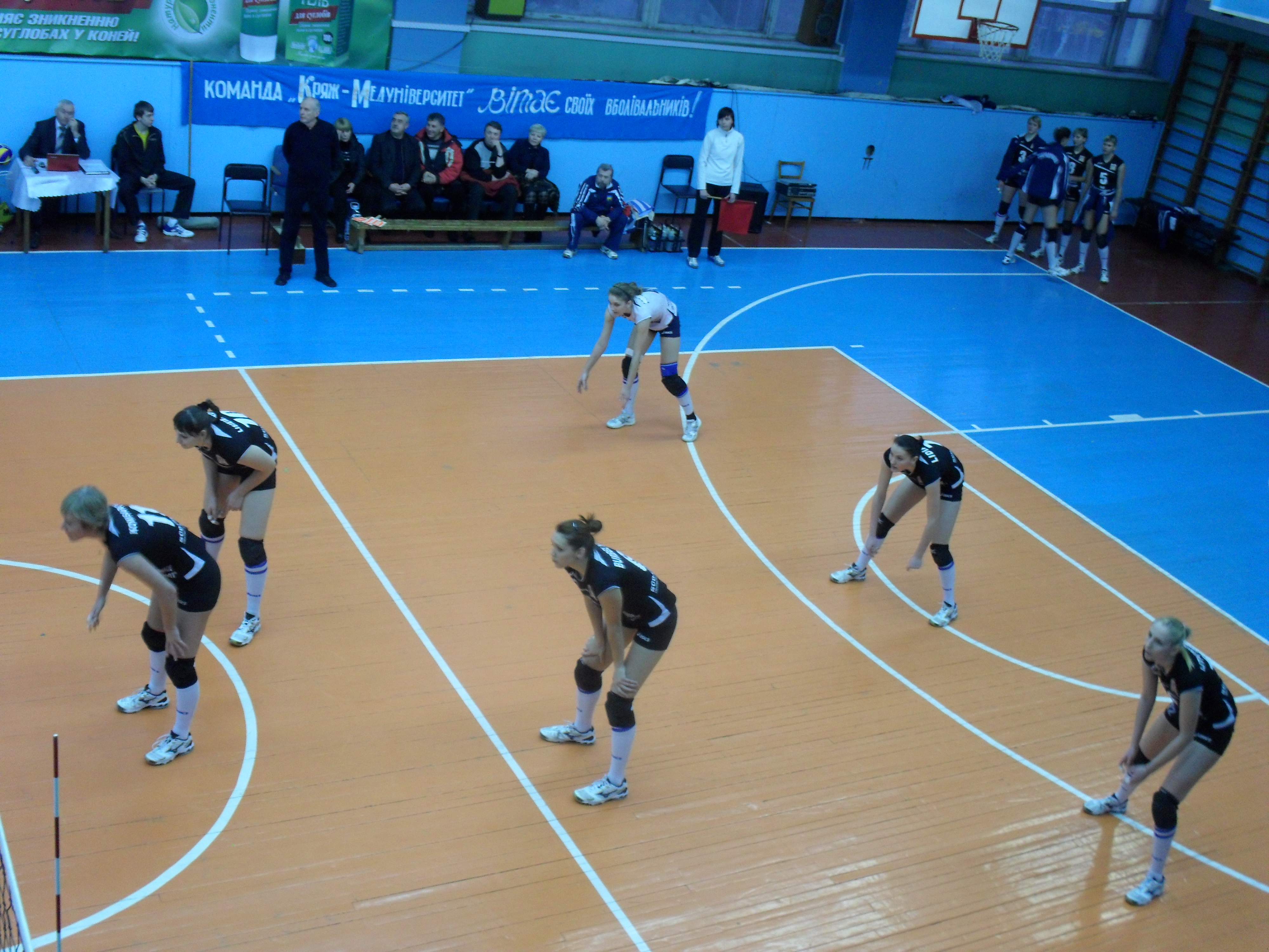 ВК "Сєвєродончанка"